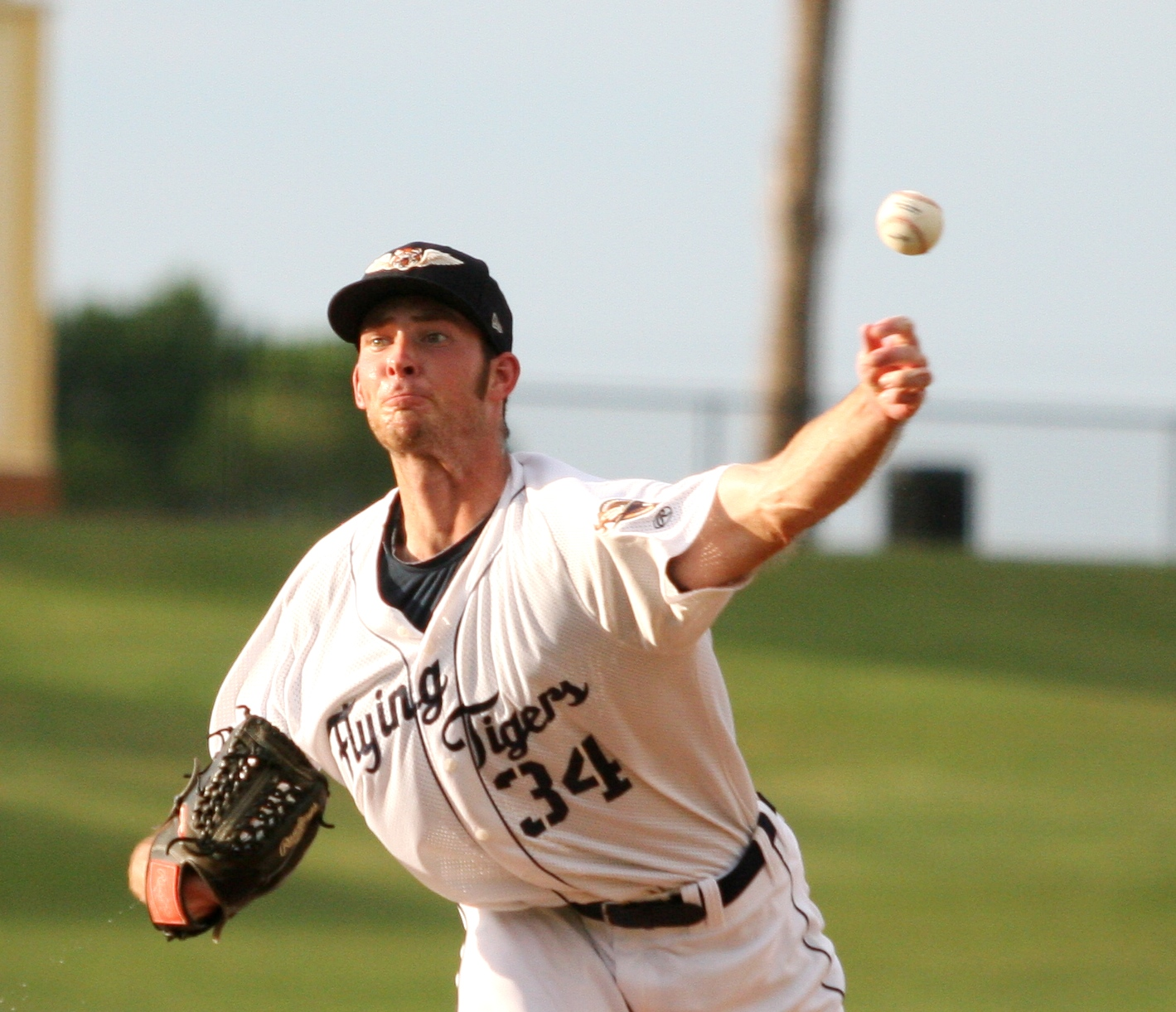 Kyle Ryan